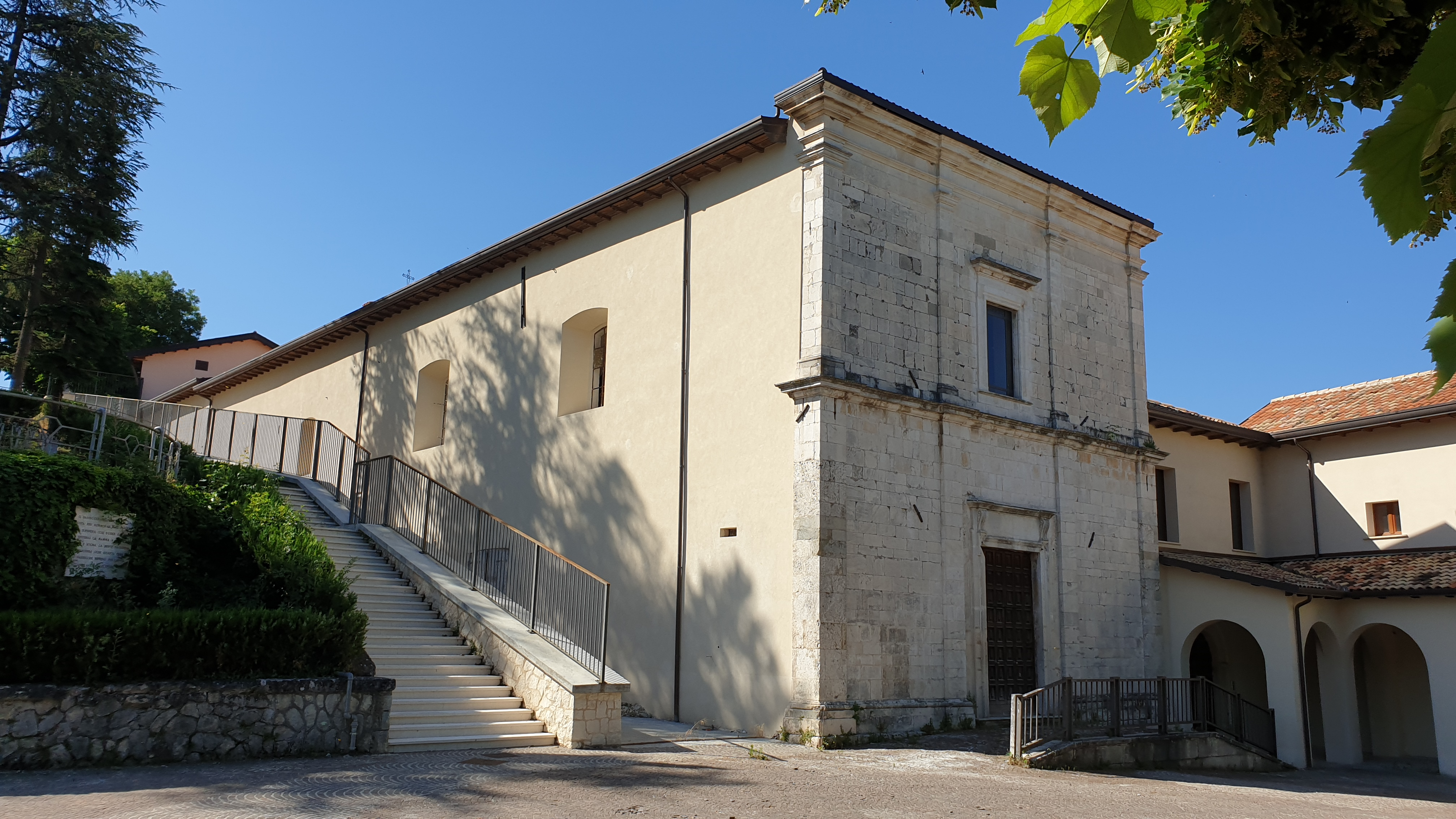 L'Aquila: Convento di Santa Chiara